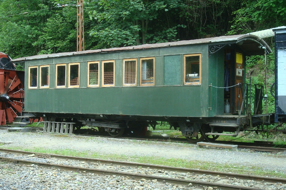 Dienstwagen X3 9951 der ehemaligen Brünigbahn (SBB Brünig), heute Zentralbahn (ZB), bei der Museumsbahn Blonay–Chamby (BC), im Einsatz als Kantine und Werkstatt in Chaulin im Sommer 2010.